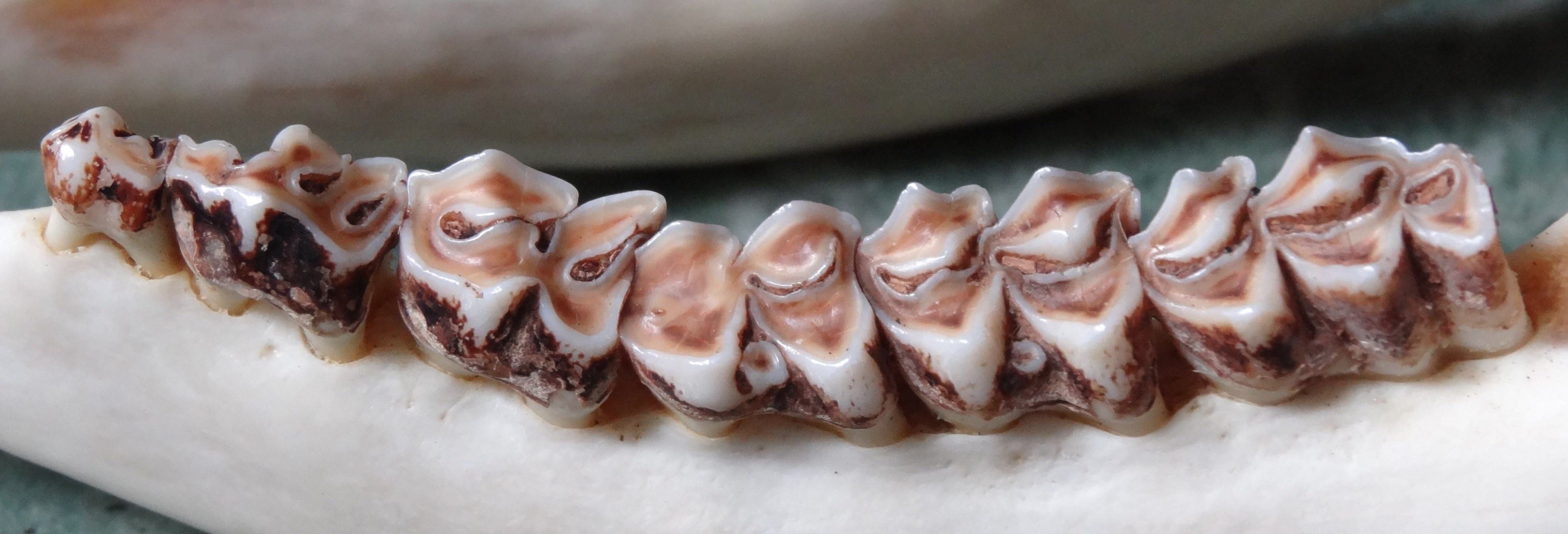 Linker Unterkieferast eines etwa 5jährigen Rehbockes. Deutlicher Zahnabschliff